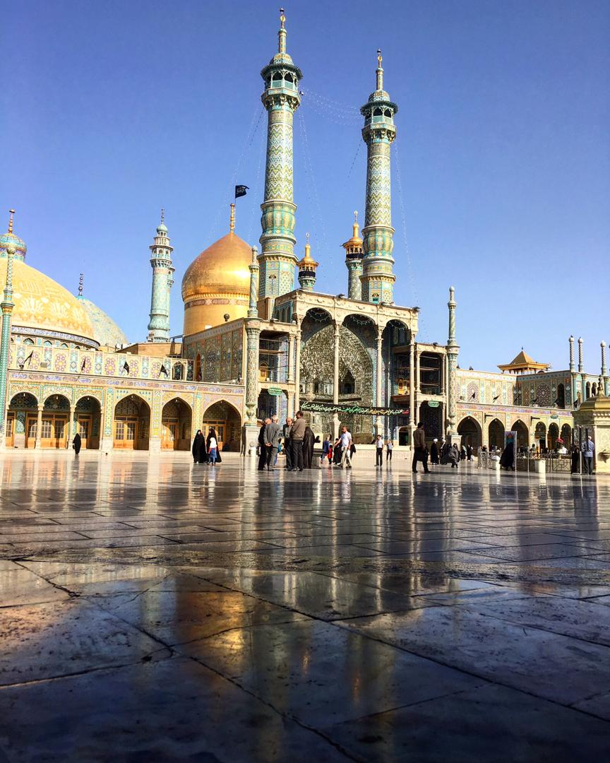 قم حرم حضرت فاطمه معصومه سلام الله علیها